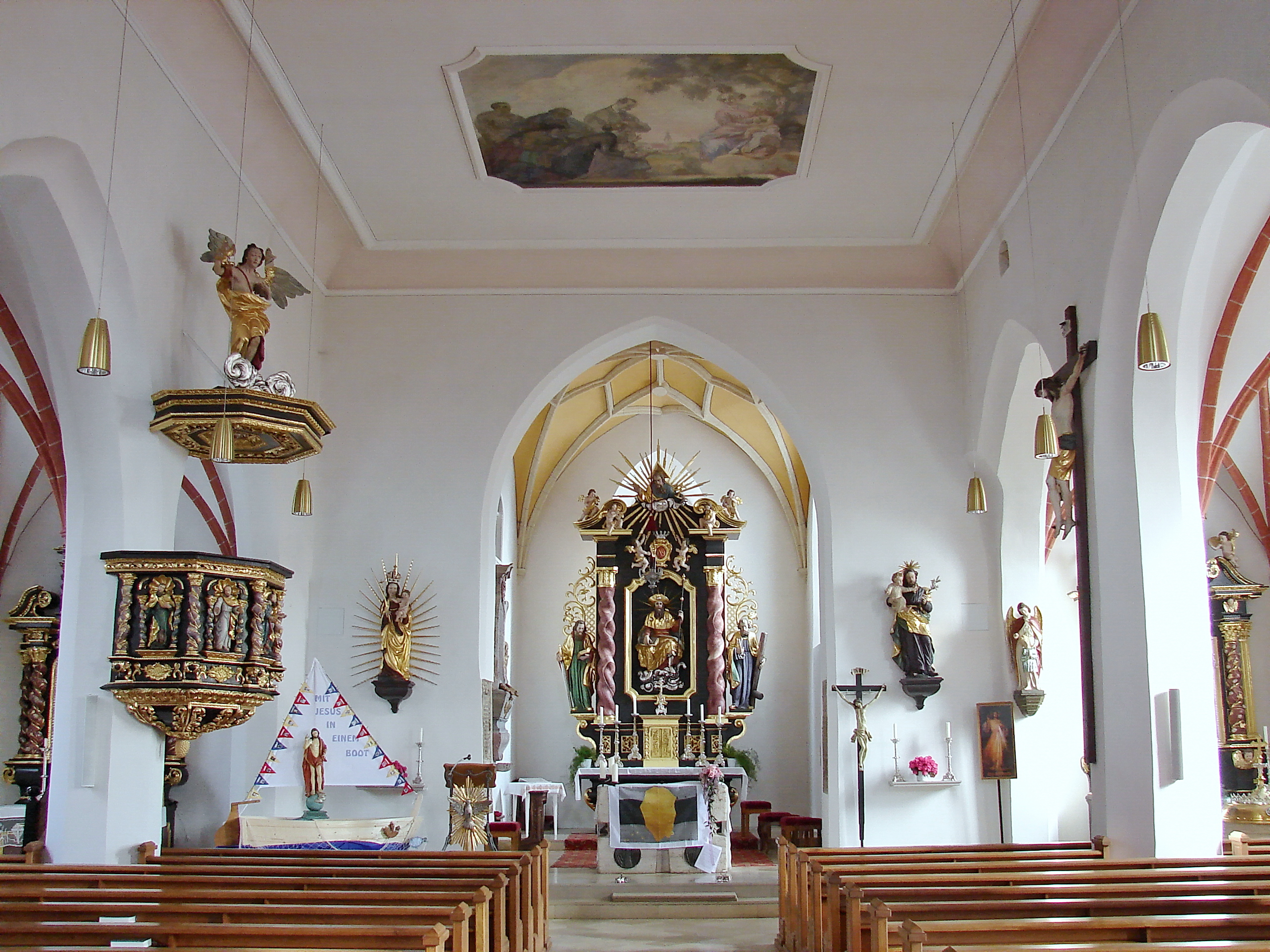 Katholische Pfarrkirche St. Jakobus der Ältere in Obersüßbach